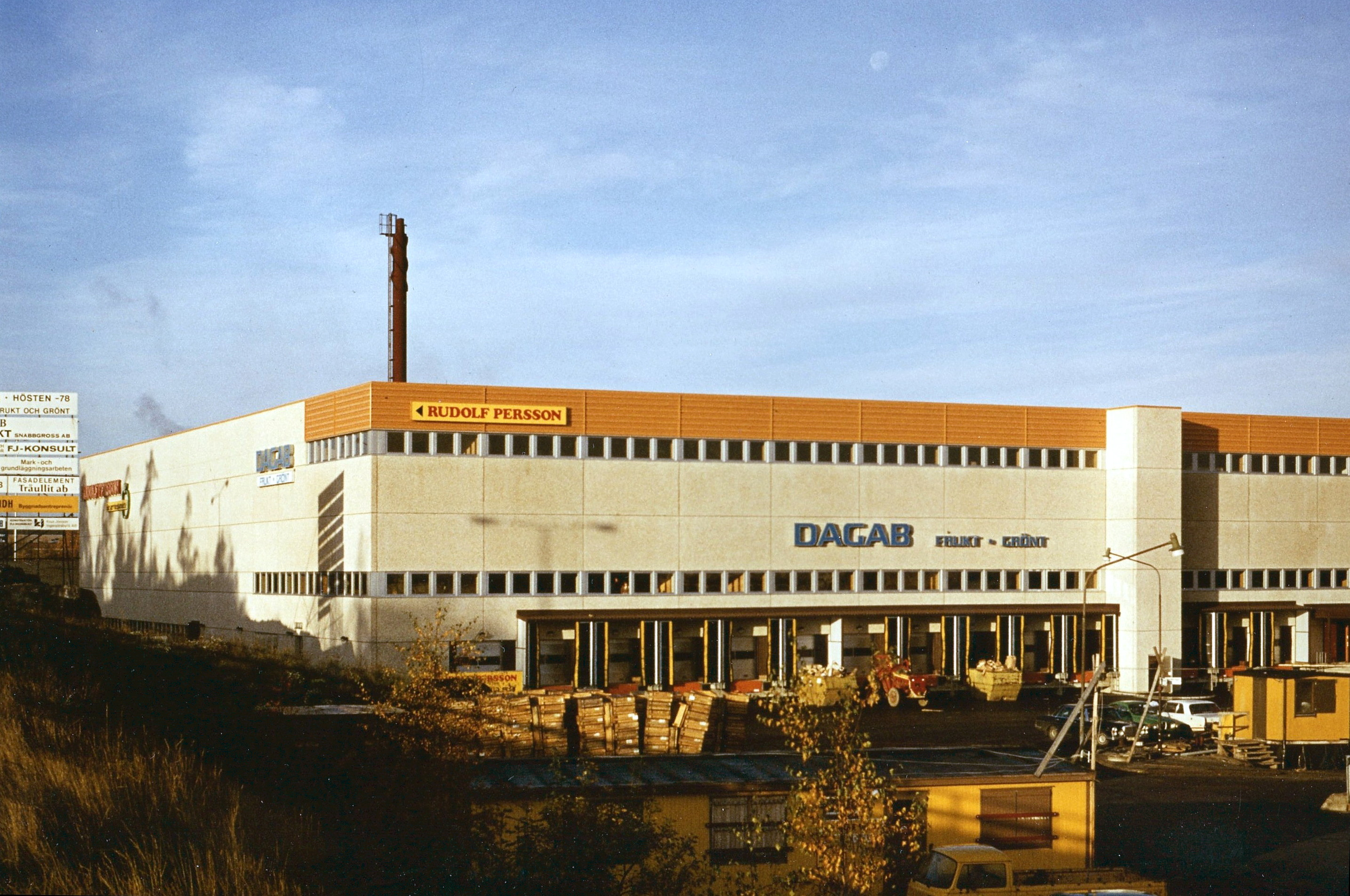 Kv. Panncentralen 1